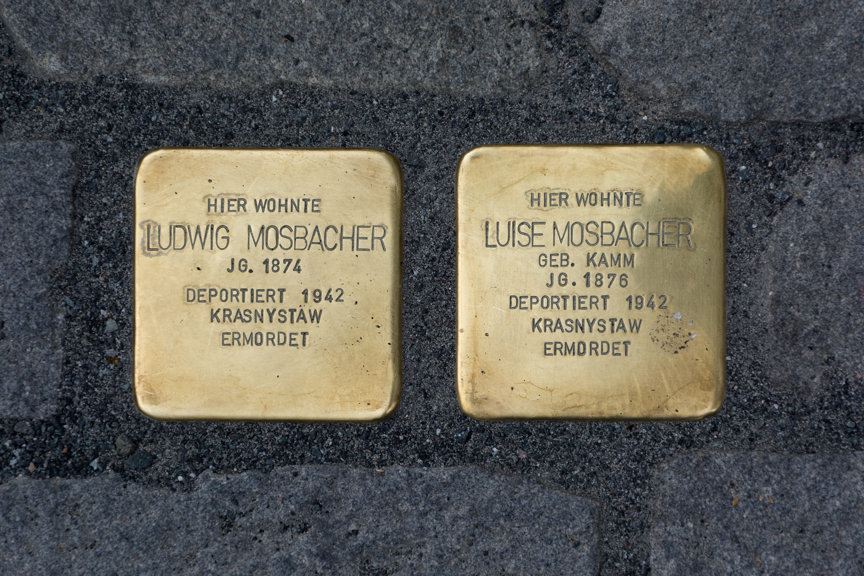 Stolpersteine für Ludwig Mosbacher und Luise Mosbacher, Bahnhofstraße 13 in Kronach